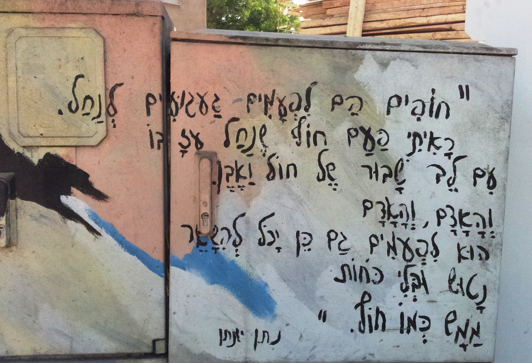 גרפיטי של אריאלה הראל עם מילות שירו של המשורר נתן יונתן : "חופים" ברחוב החי"ל רעננה